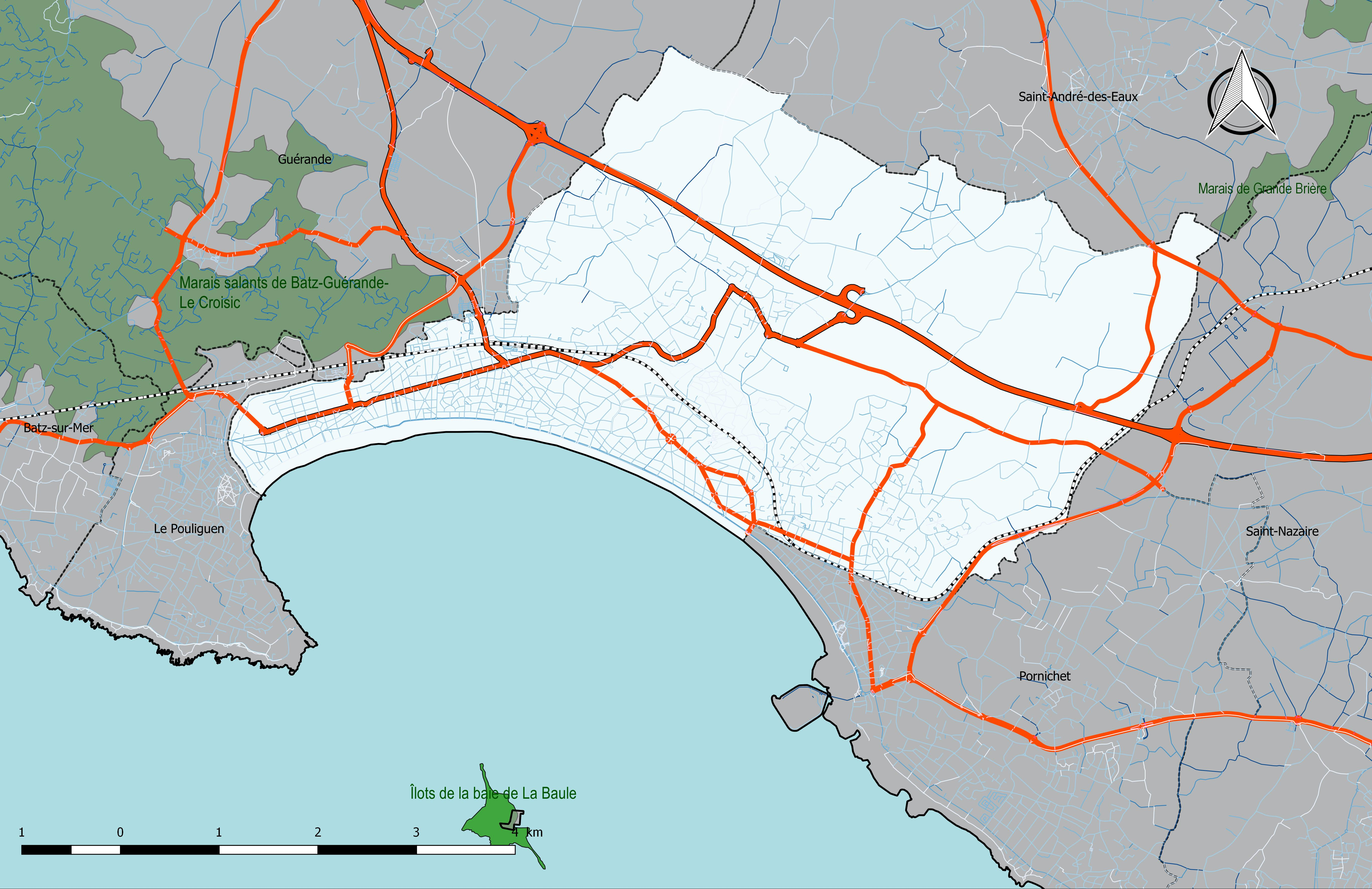 Commune de La Baule-Escoublac - Carte des ZNIEFF de type 1